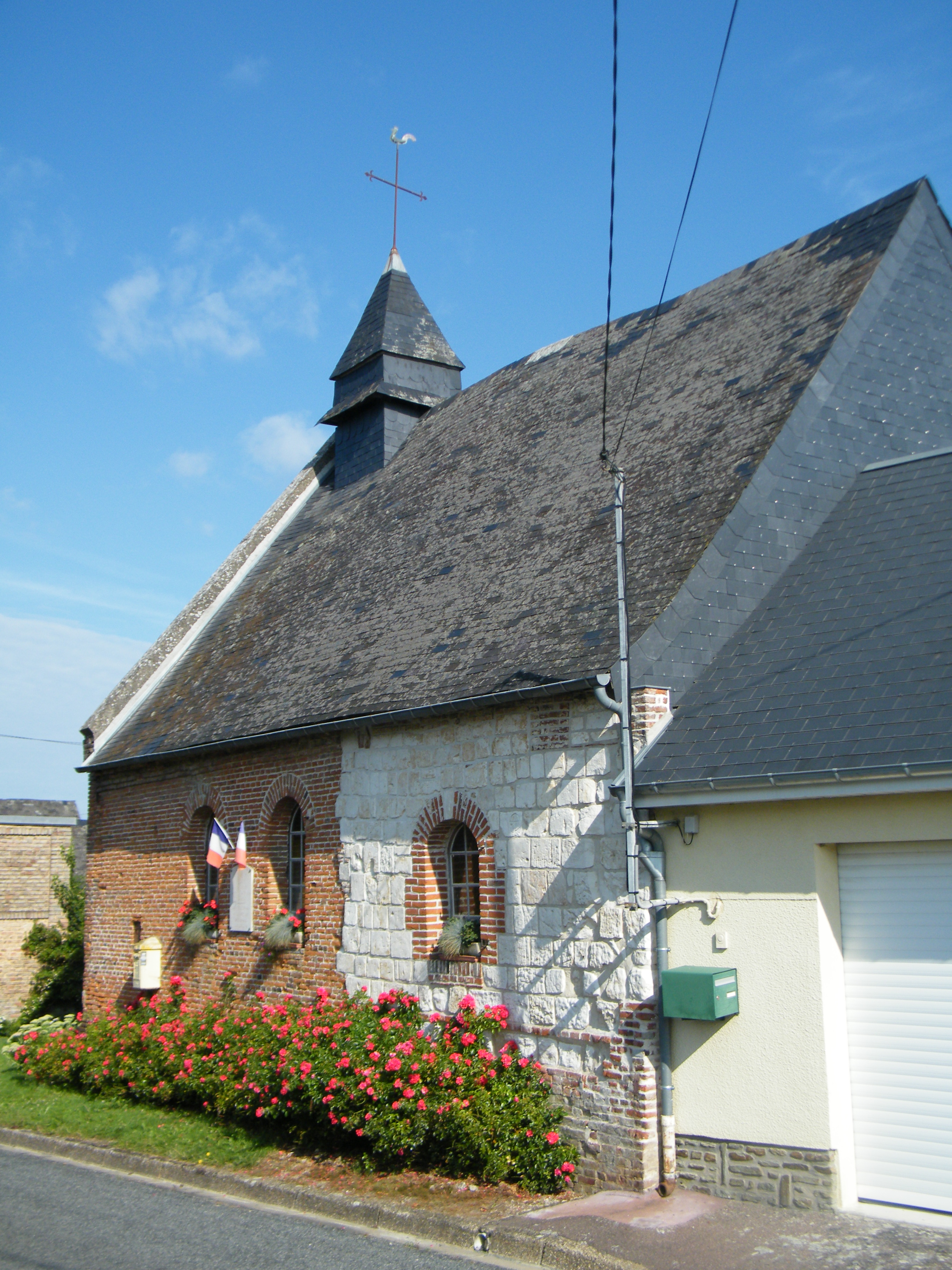 église.